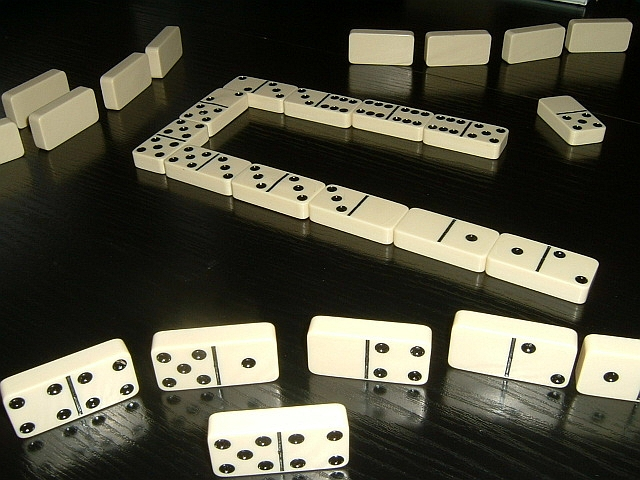 selbst fotografiert am 11.12.04, GNU, FDL, Bild:Domonosteine im Spiel